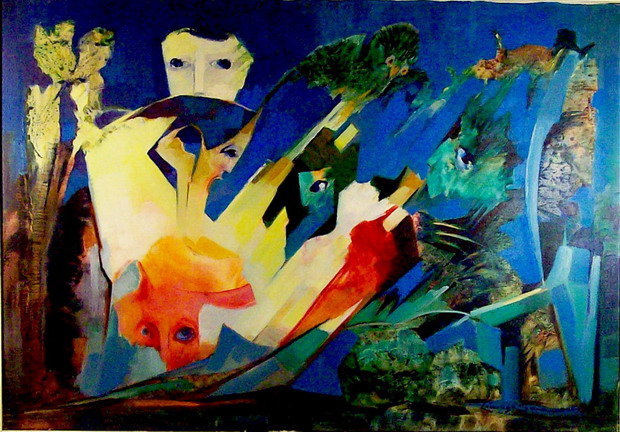 Quadro di Licurgo Sommariva: Gli sguardi